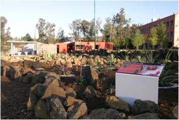 Panorámica de los Arriates del Ecojardín-UNAM